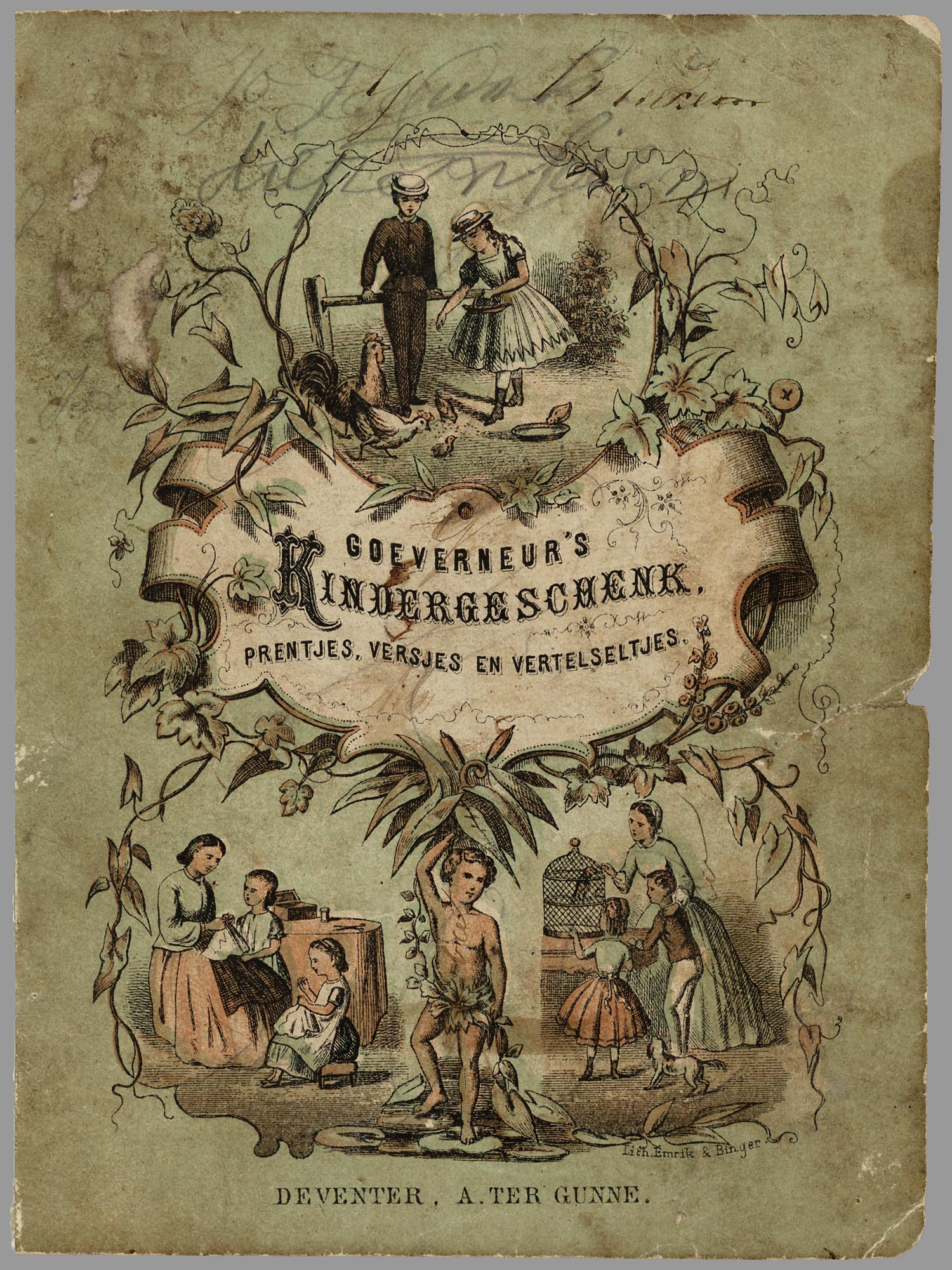 Boek met 4 verhalen, op rijm en in proza, van 2 of 3 pagina's, elk voorzien van een gekleurde litho. Onderwerpen: De bokkewagen; De vlijtige meisjes (ze naaien kleding); Het jonge katje (vervolg op 'De vlijtige meisjes'); De schaapjes. Op de voorkant in bruin en groen enkele scènes uit het boek. Kindergeschenk 10 p., 4 bl. pl : gekl. lith // Litho's gedrukt door Emrik & Binger // f 0,30 Verhalenbundels // Gedichtenbundels